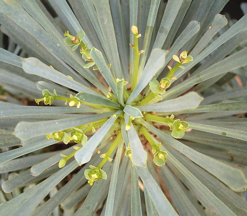 Euphorbia multifolia